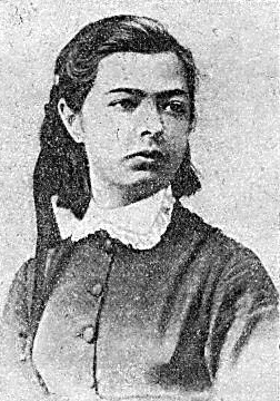 Ol'ga Spiridonovna Ljubatovich